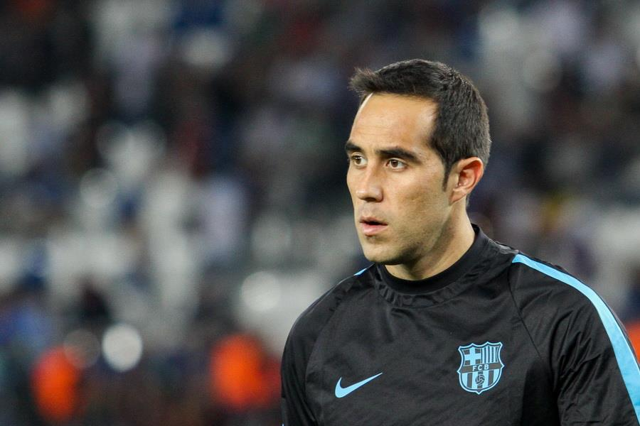 Перед матчем за Суперкубок УЄФА 2015 року у Тбілісі. Грузія